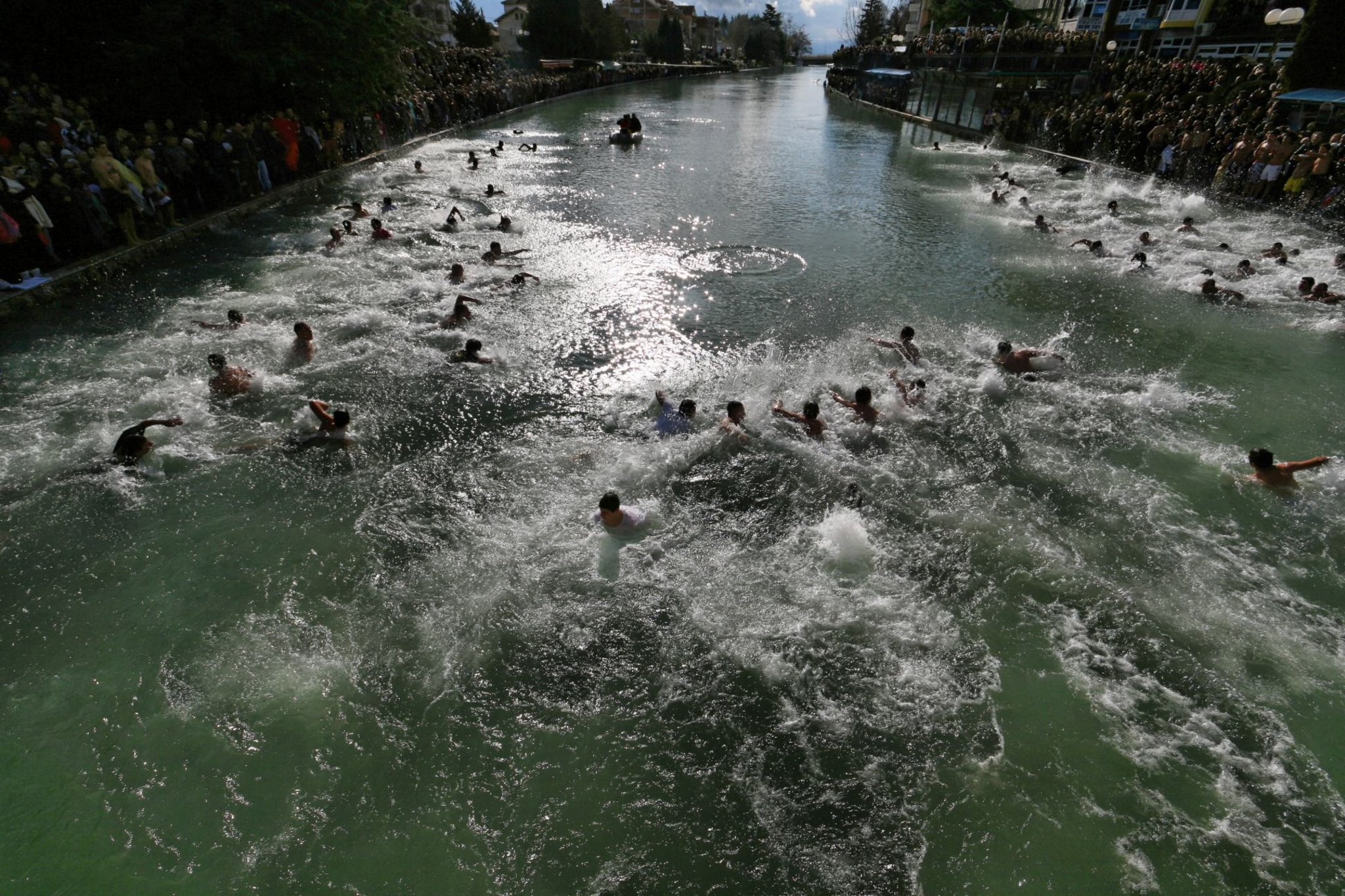 Скокање по крстот во Струга по повод Водици во 2013 г.